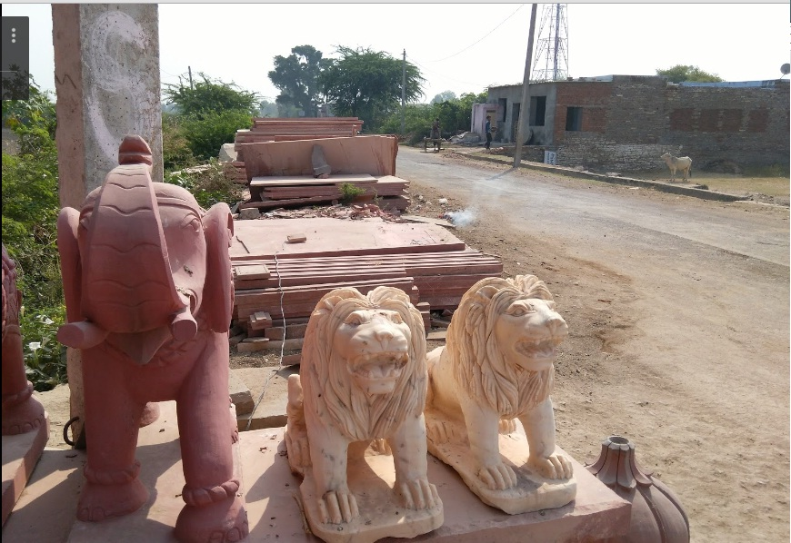 Jyoti murtikala udyog